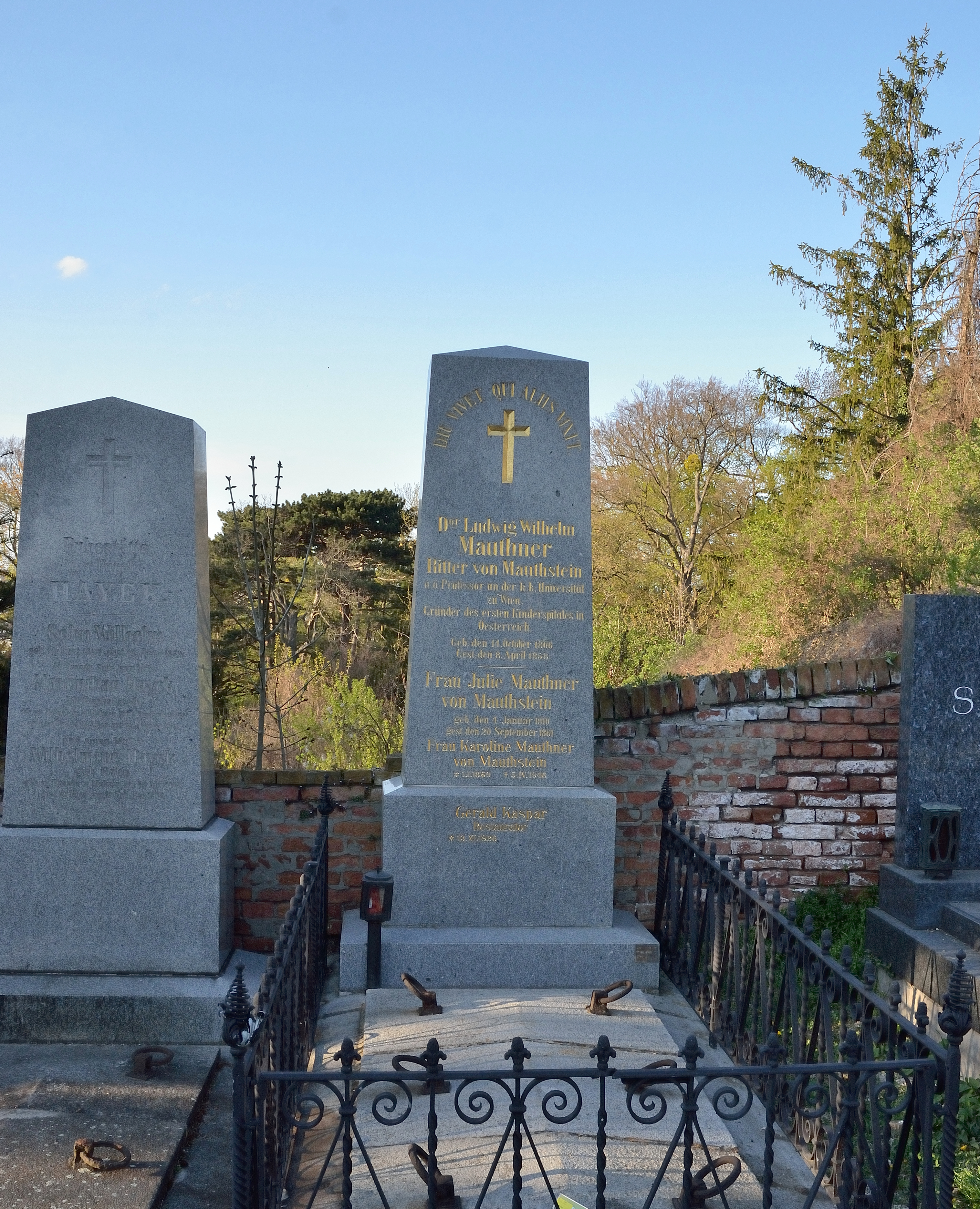 Grabmal für den Kinderarzt Ludwig Wilhelm Mauthner von Mauthstein am Hietzinger Friedhof, Gruppe 6, Nr. 17.